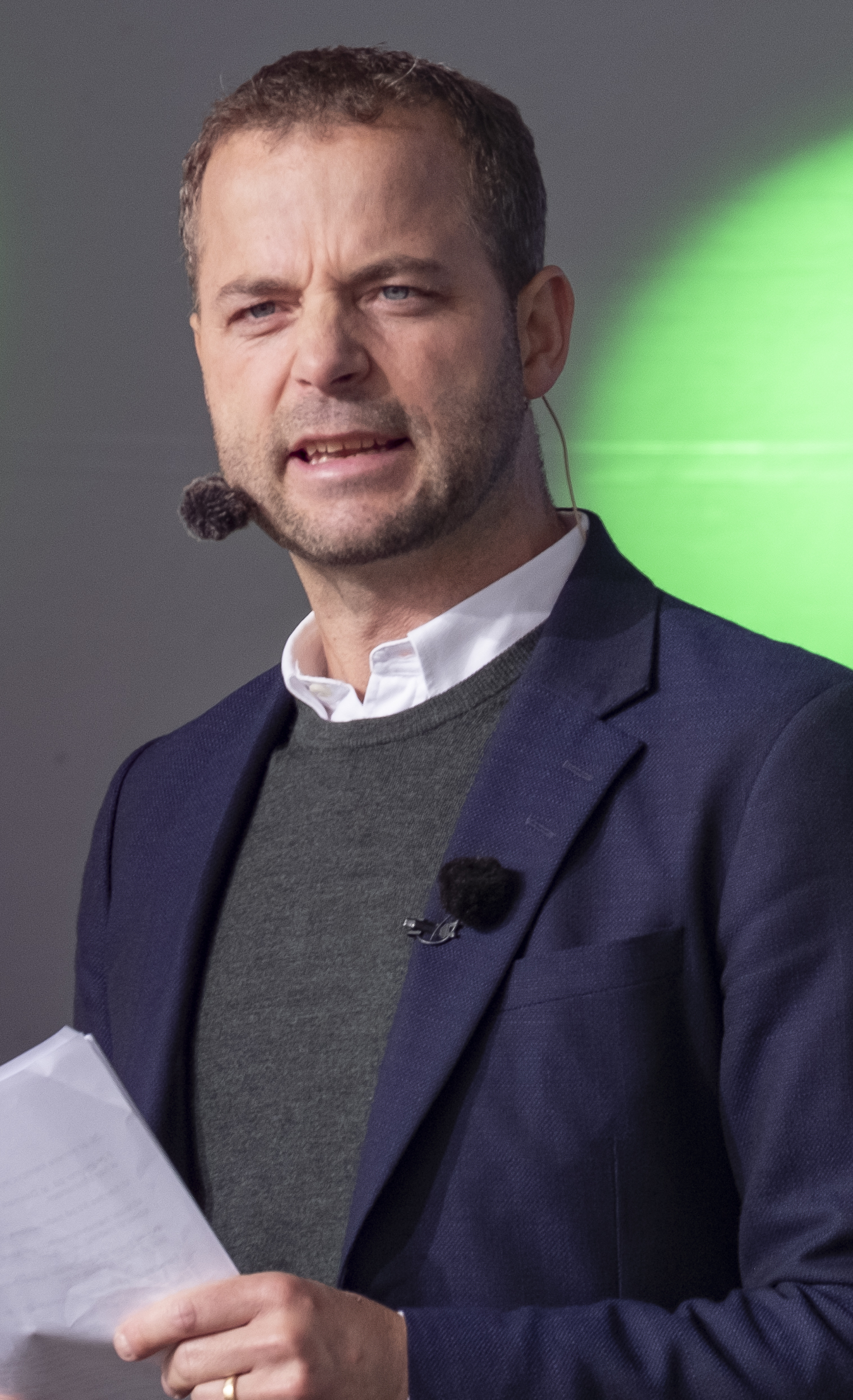 20190613. Folkemødet i Allinge på Bornholm. Photo: News Øresund - Johan Wessman © News Øresund - Johan Wessman (CC BY 3.0). Detta verk av News Øresund är licensierat under en Creative Commons Erkännande 3.0 Unported-licens (CC BY 3.0). Bilden får fritt publiceras under förutsättning att källa anges. .The picture can be used freely under the prerequisite that the source is given. News Øresund, Malmö, Sweden News Øresund är en oberoende regional nyhetsbyrå som är en del av det oberoende dansk-svenska kunskapscentrat Øresundsinstituttet.. .